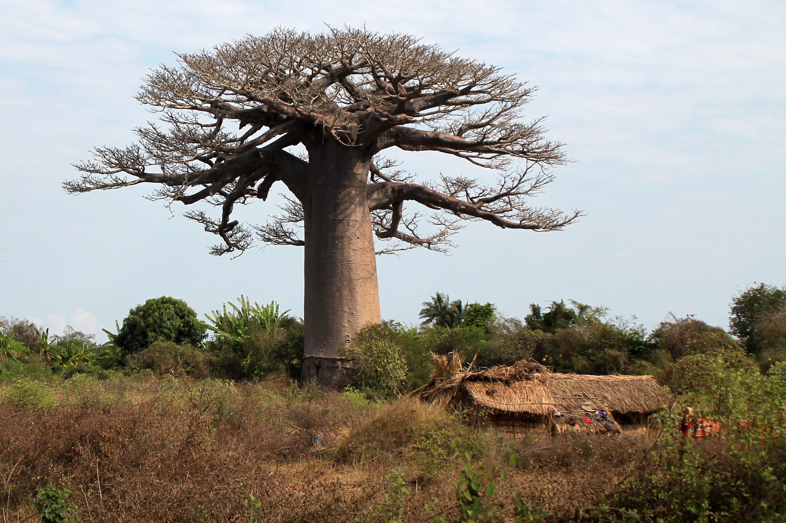 baobab sacree